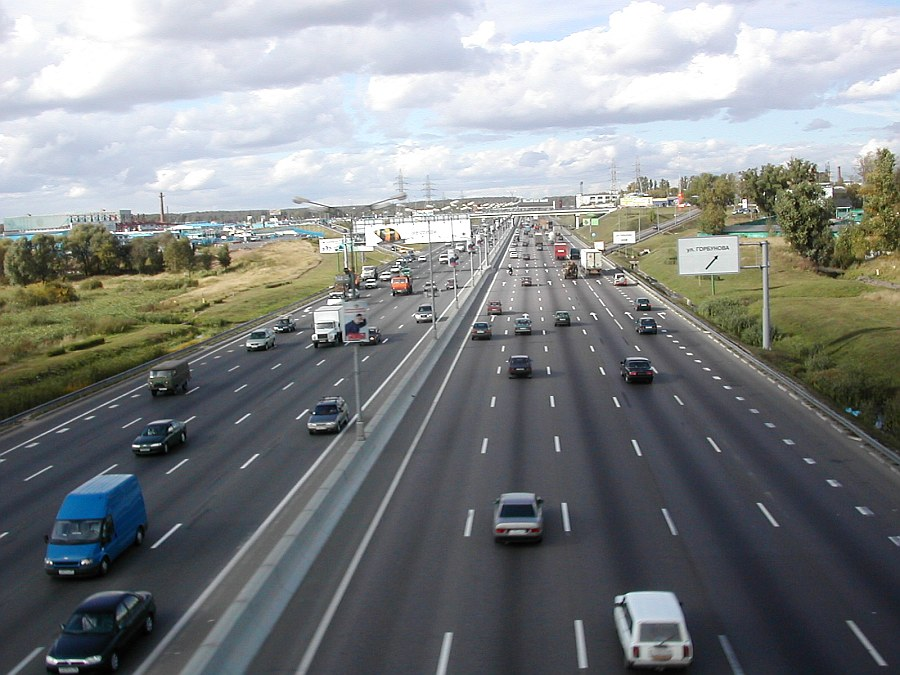 Moskiewska obwodnica MKAD, 16 września 2005 r.